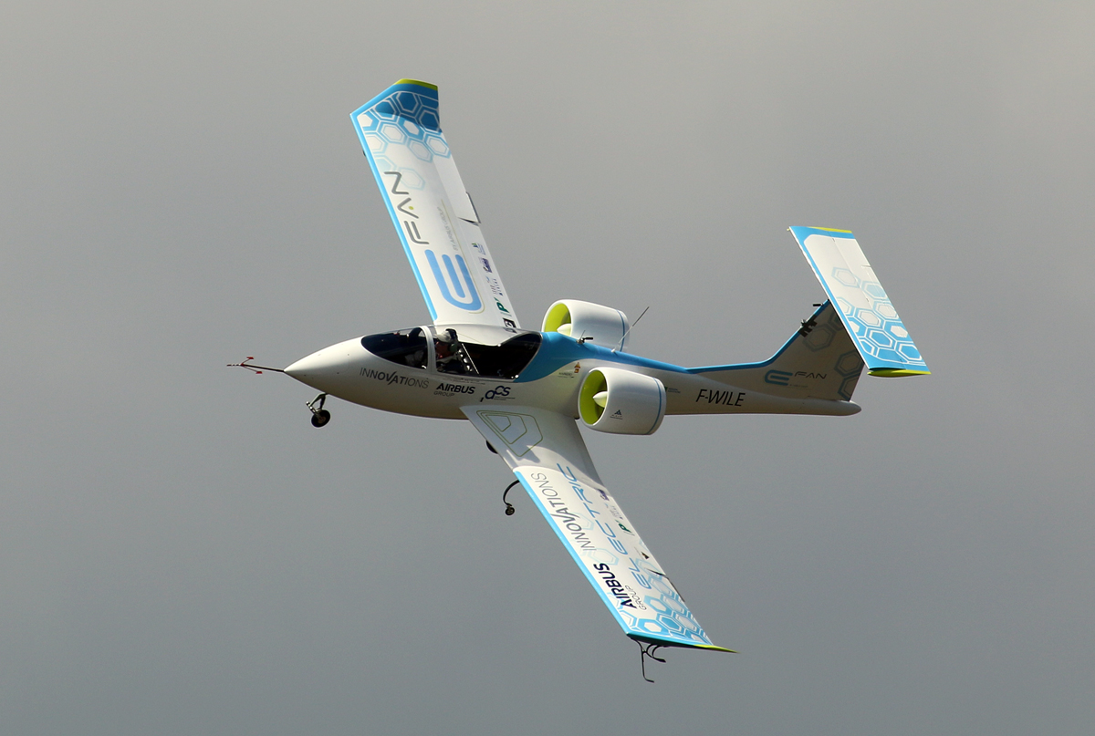 F-WILE